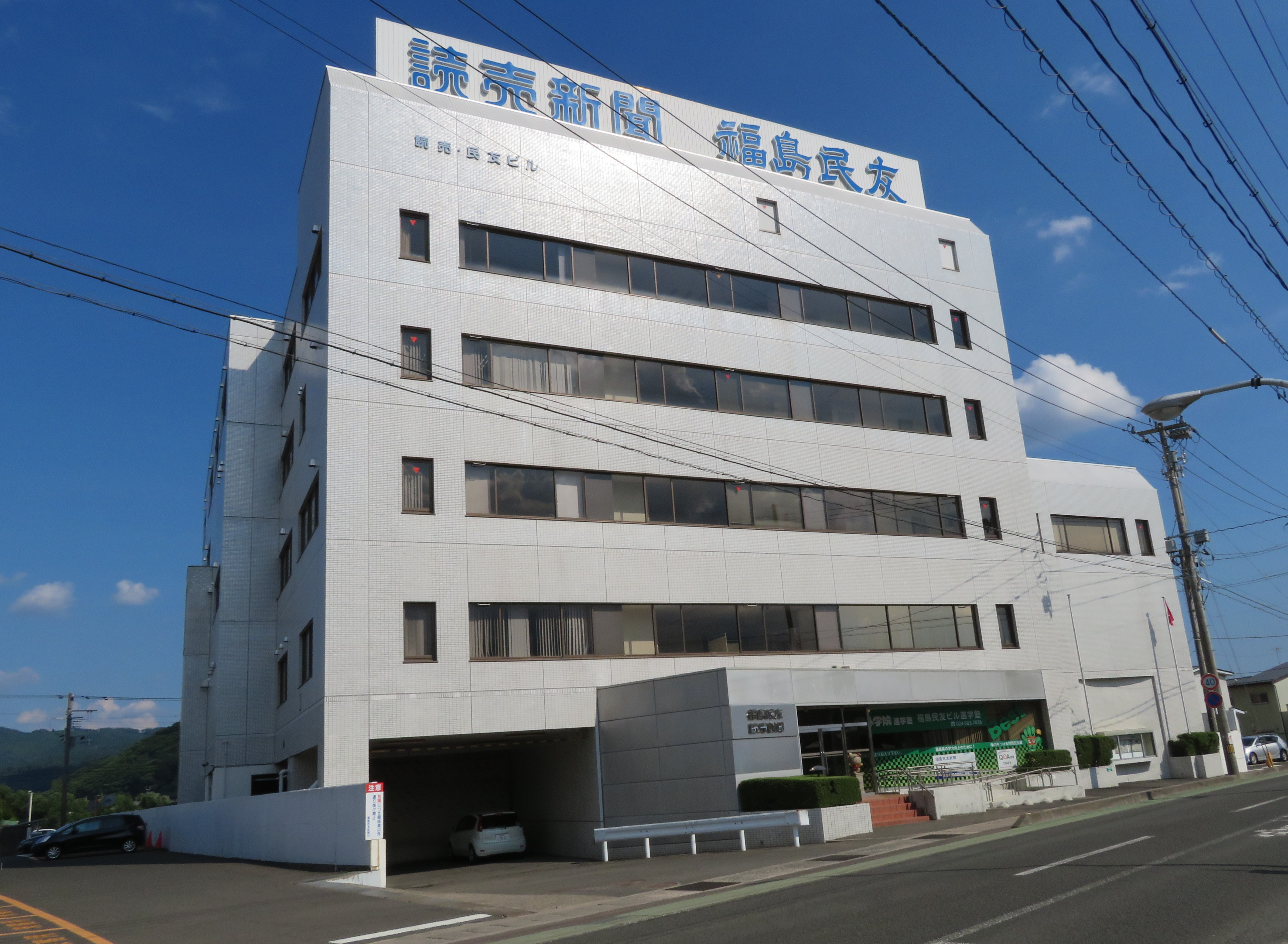 福島民友新聞本社ビル Canon PowerShot SX720 HS